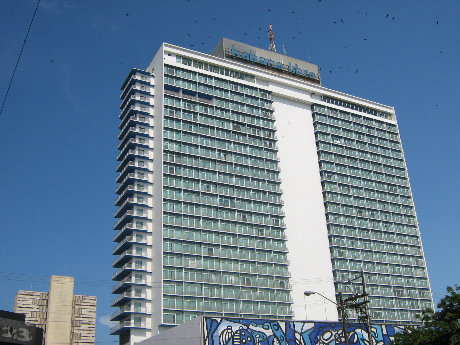 Hotel Habana Libre, antiguo Hilton